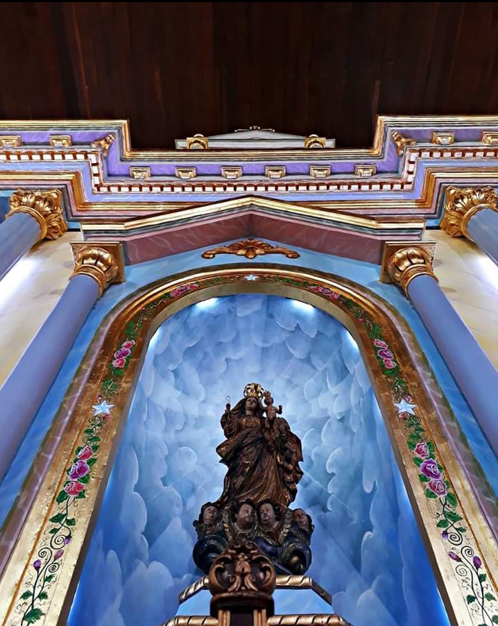 Padroeira da Catedral